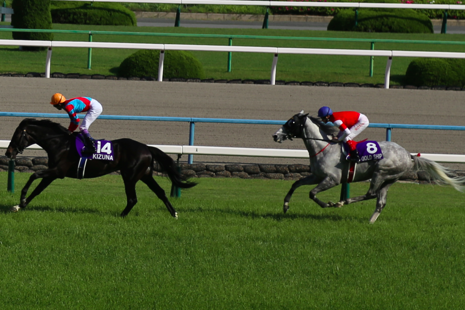 2014年天皇賞（春）でのゴールドシップ